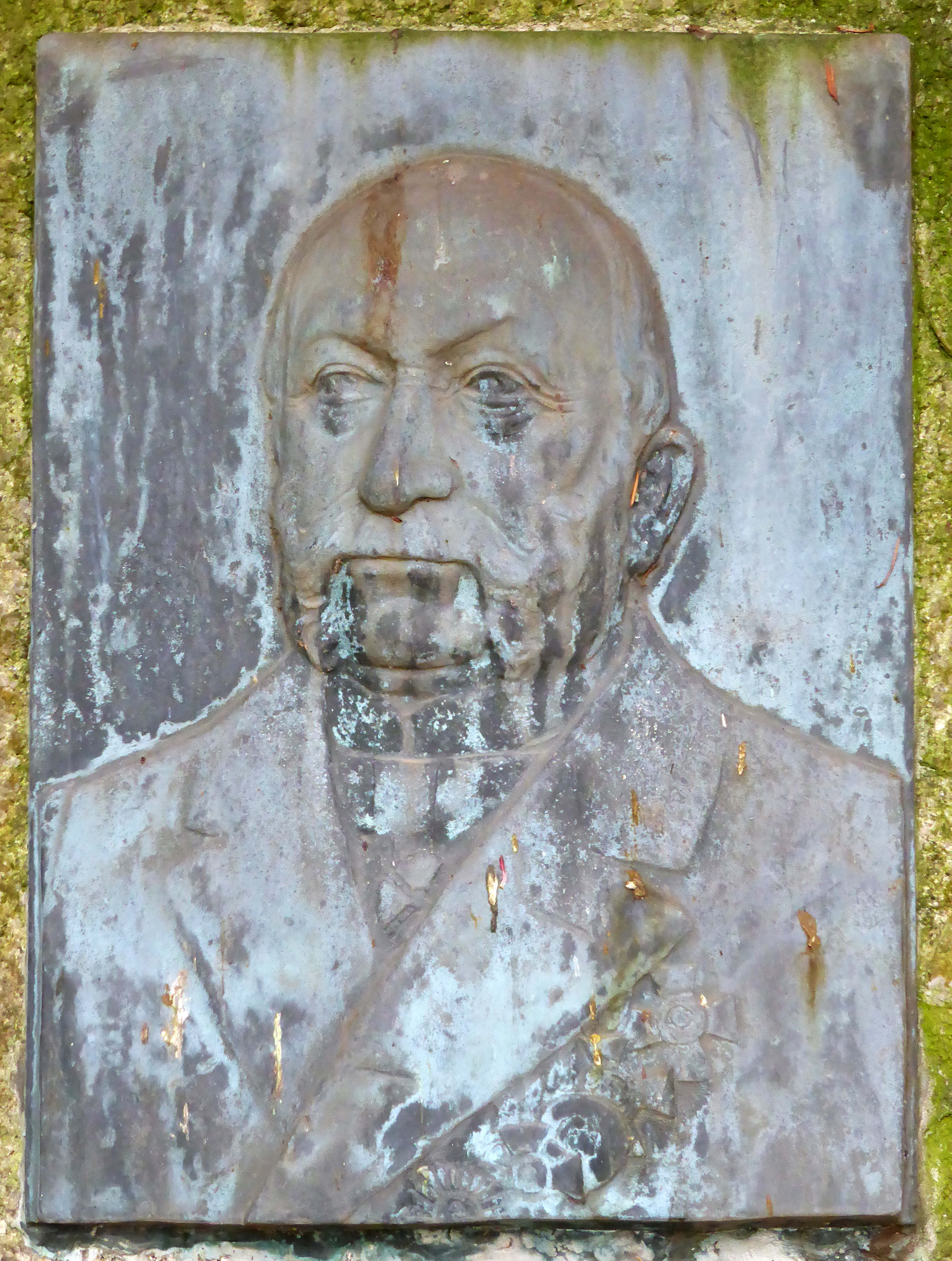 Gedenkstein für Julius Niepraschk, Gründungsdirektor der Flora (Köln) von 1862 bis 1890. (Bronzerelief)